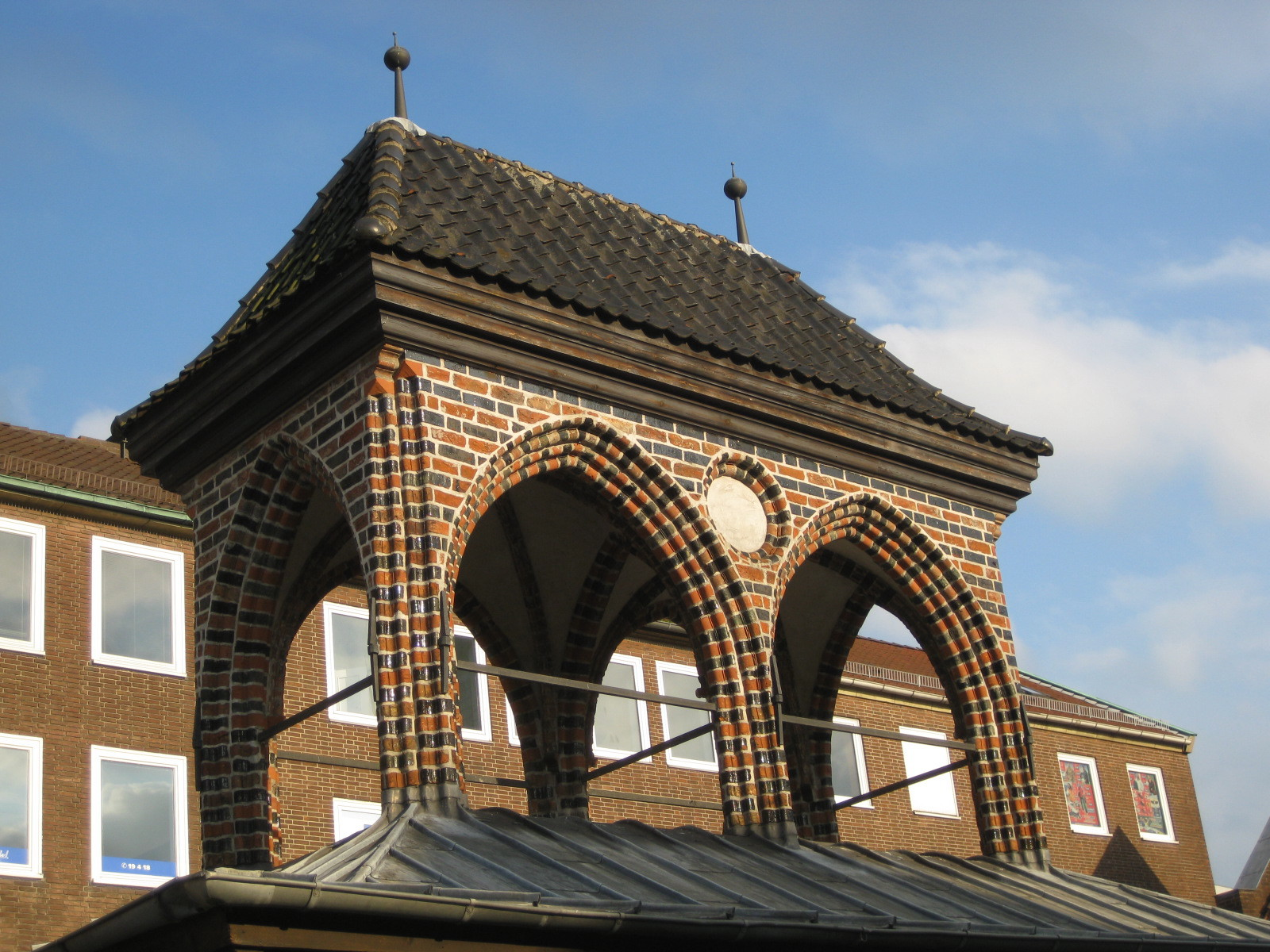 Der Kaak (Lübeck) (Pranger) in Lübeck, hier das Obergeschoss, der so genannte Finkenbauer Standort: Markt Lübeck, mittelalterliches backsteingotisches Gebäude, 1952 abgetragen und 1986 neu errichtet. Der Finkenbauer besteht aus dem mittelalterlichen Baumaterial; das untere Geschoss (nier nicht im Bild) wurde verändert neu errichtet Ansicht von Westen, im Hintergrund Nachkriegsbebauung